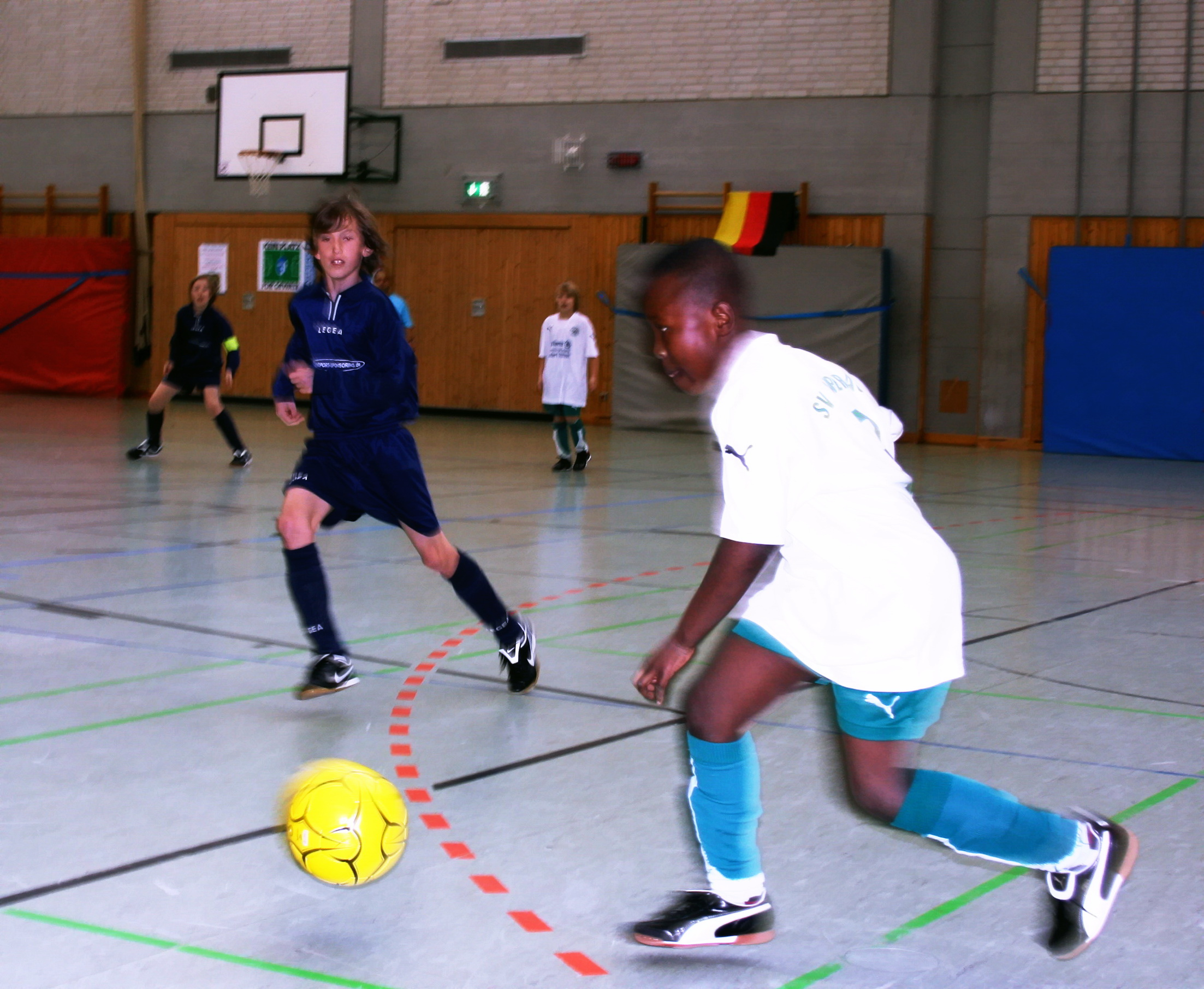 Hallenfußballturnier in München. D-Jugend.